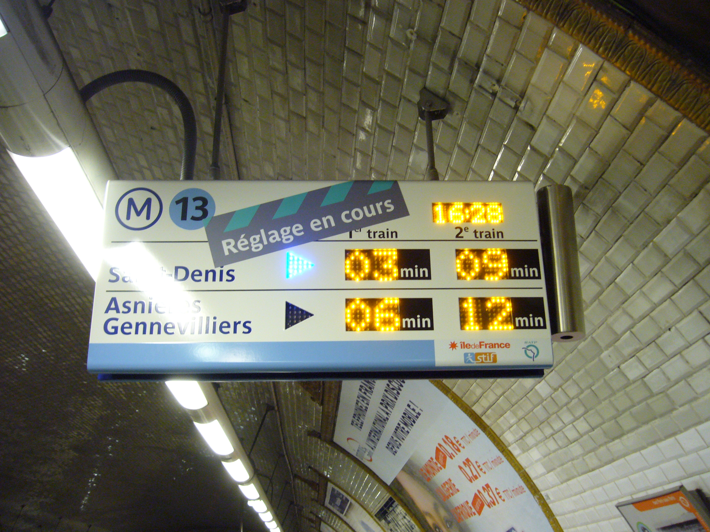 Un panneau SIEL indique les temps d'attente des quatre prochains trains en direction du nord sur la ligne 13 du métro de Paris.